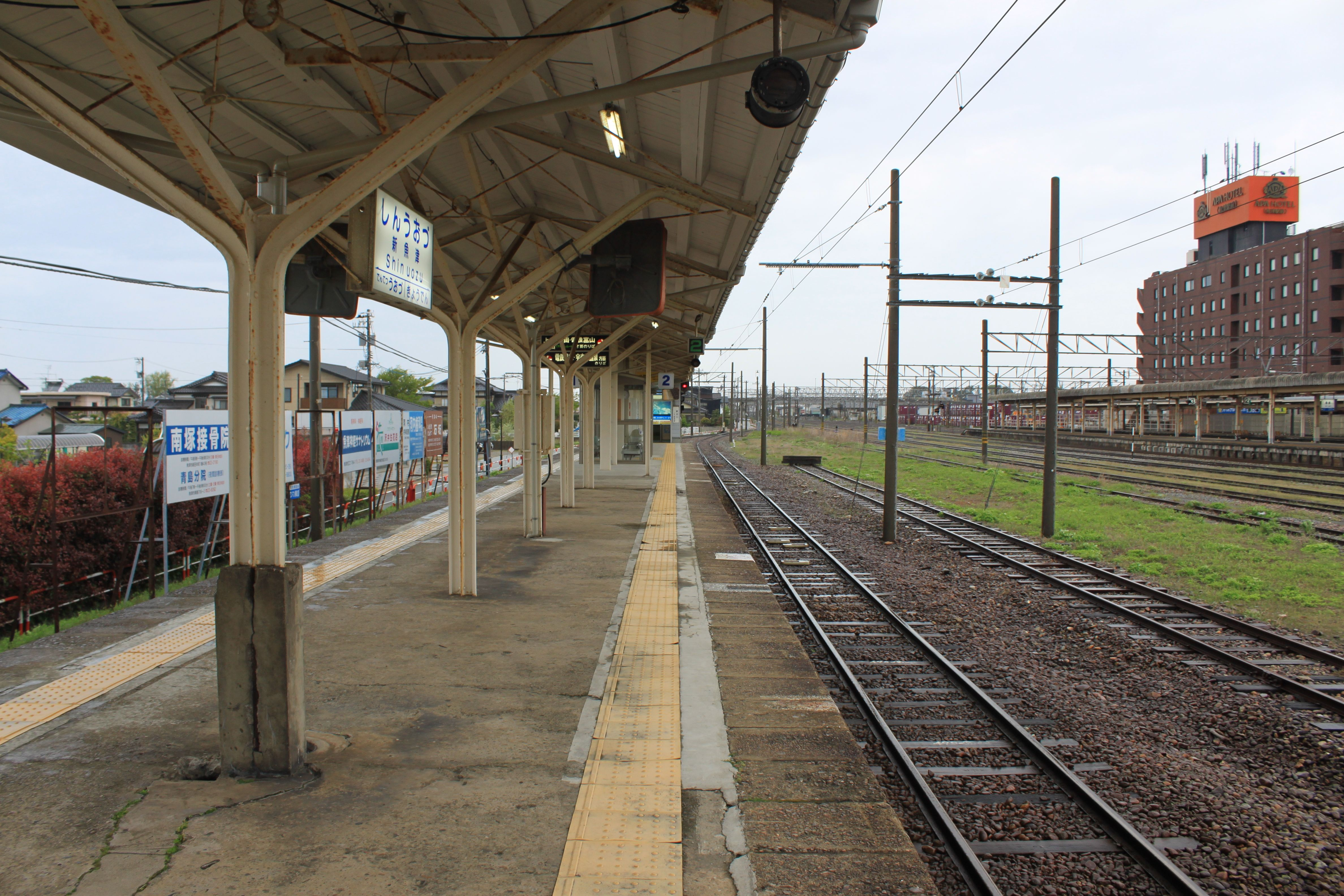 新魚津駅